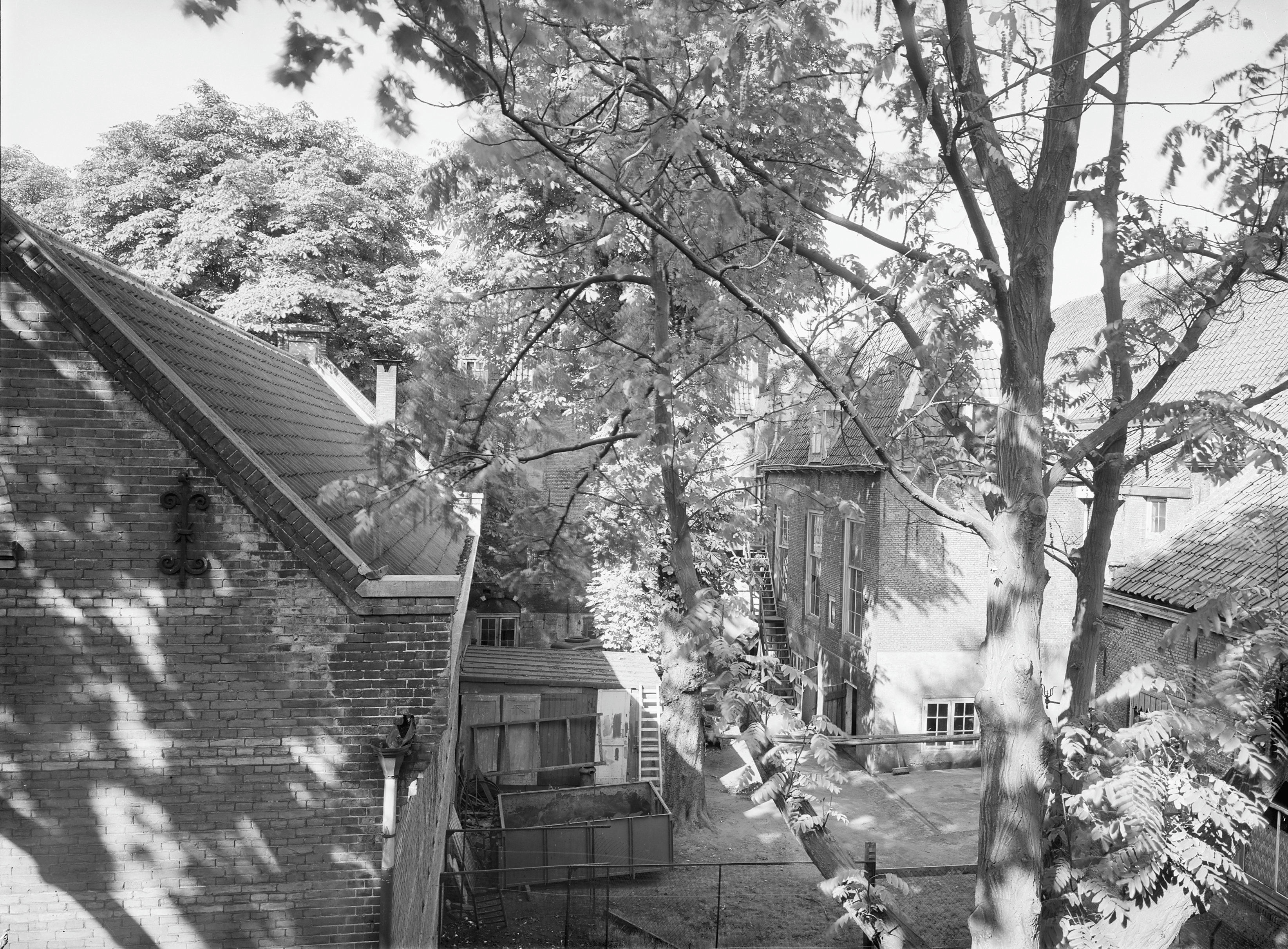 Looihallen: Jeruzalemstr. 7